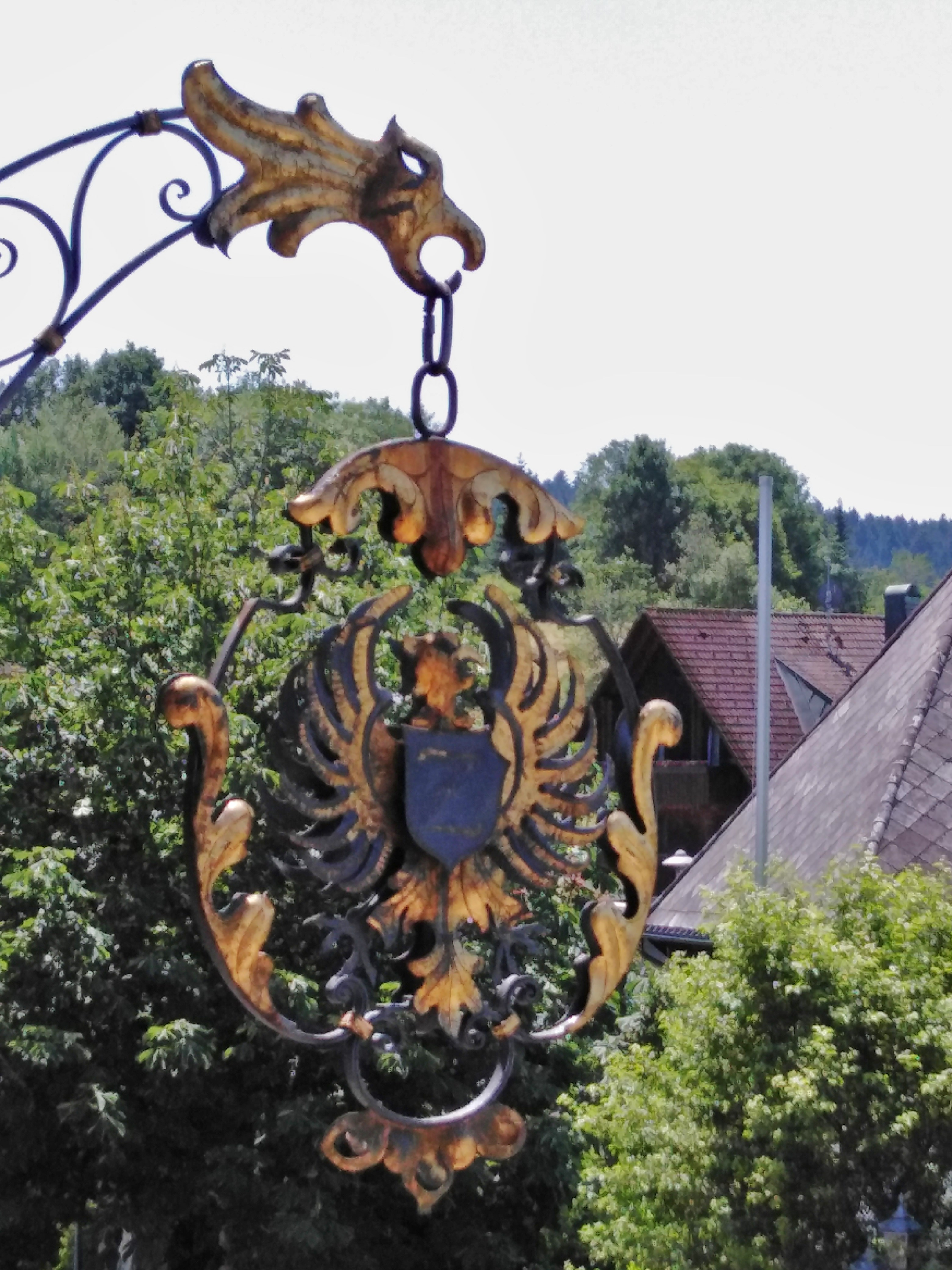 Gasthof Adler in der Gemeinde Häusern im Landkreis Waldshut in Baden-Württemberg im Südschwarzwald. Wappenschild des Gasthofes. 1596 Verleihung des Tafernrechts. Seit 1966 wird das Restaurant Adler Häusern mit einem Michelin Stern ausgezeichnet. Es gilt als das älteste, kontinuierlich ausgezeichnete Sternerestaurant Deutschlands.